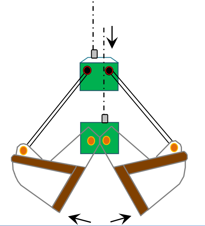 2х-канатный грейфер - операция 5